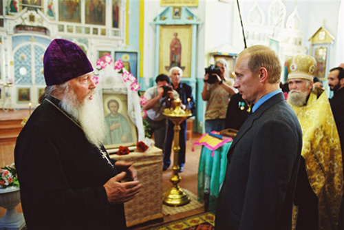 КАБАРДИНО-БАЛКАРИЯ, СТАНИЦА ЕКАТЕРИНОГРАДСКАЯ. В храме Св.Евфимия.